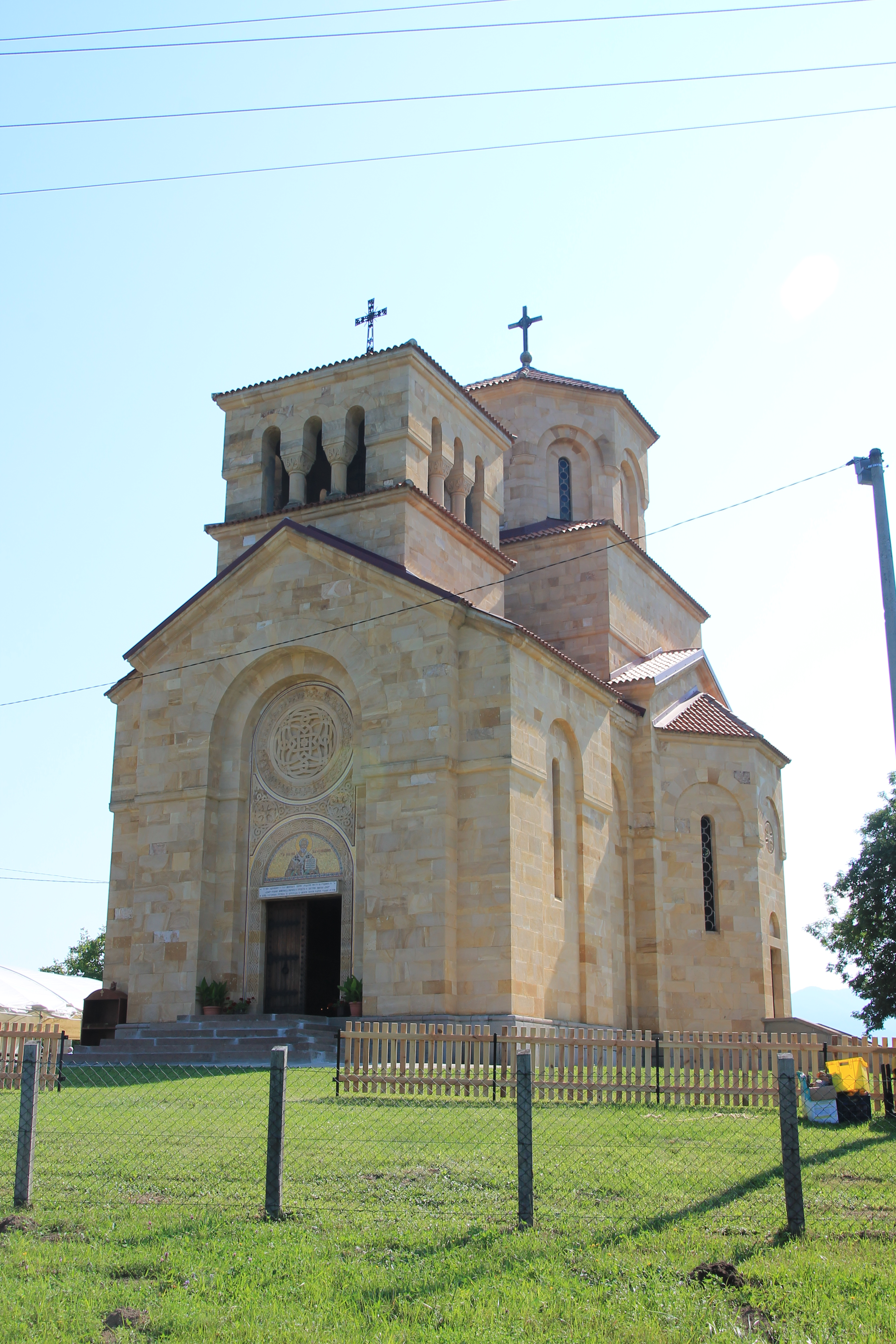 Crkva Sv. Nikolaja Mirlikijskog (Šilopaj)